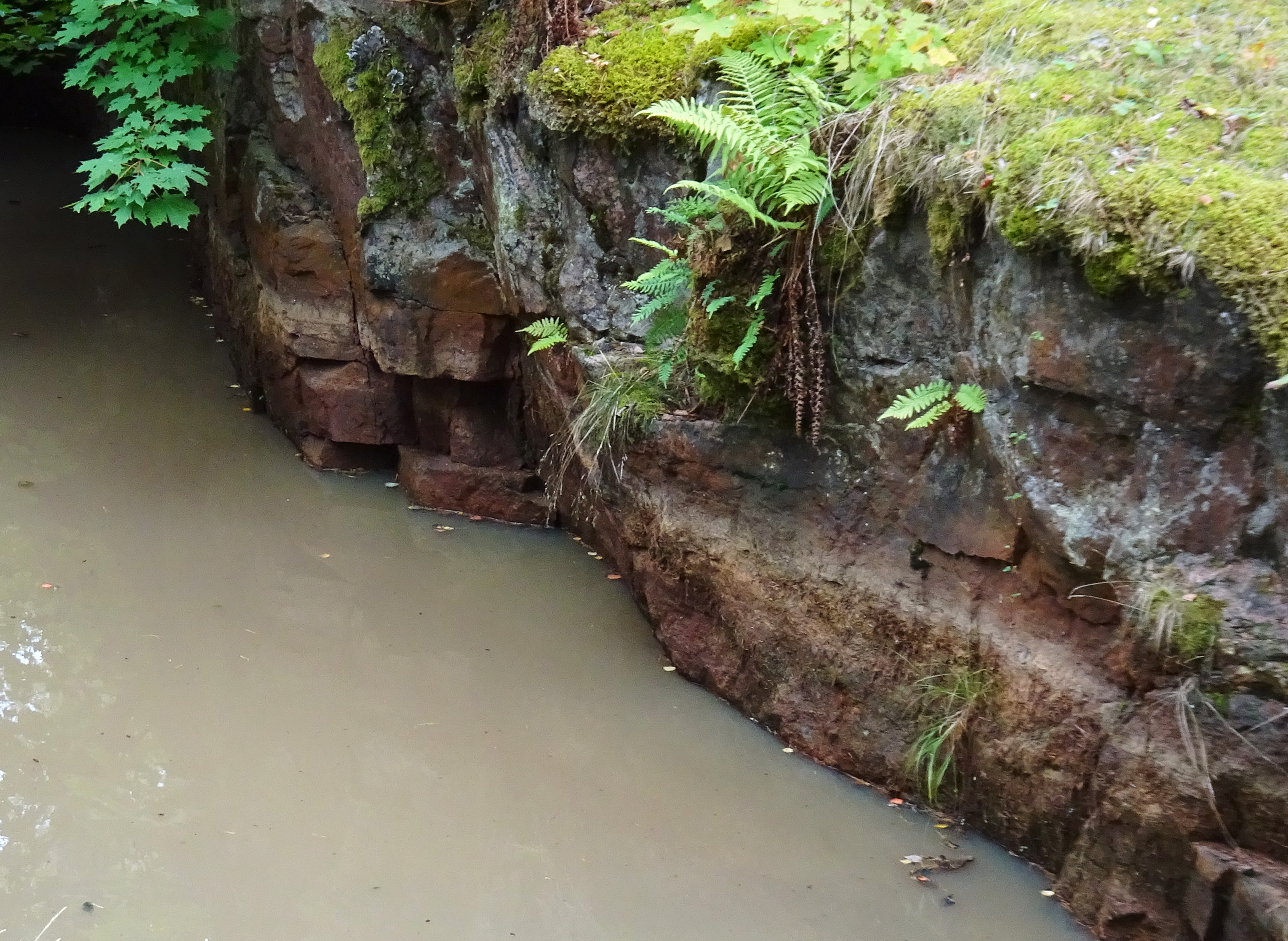 Knaperhälls gruva, vattenfylld gruvhål